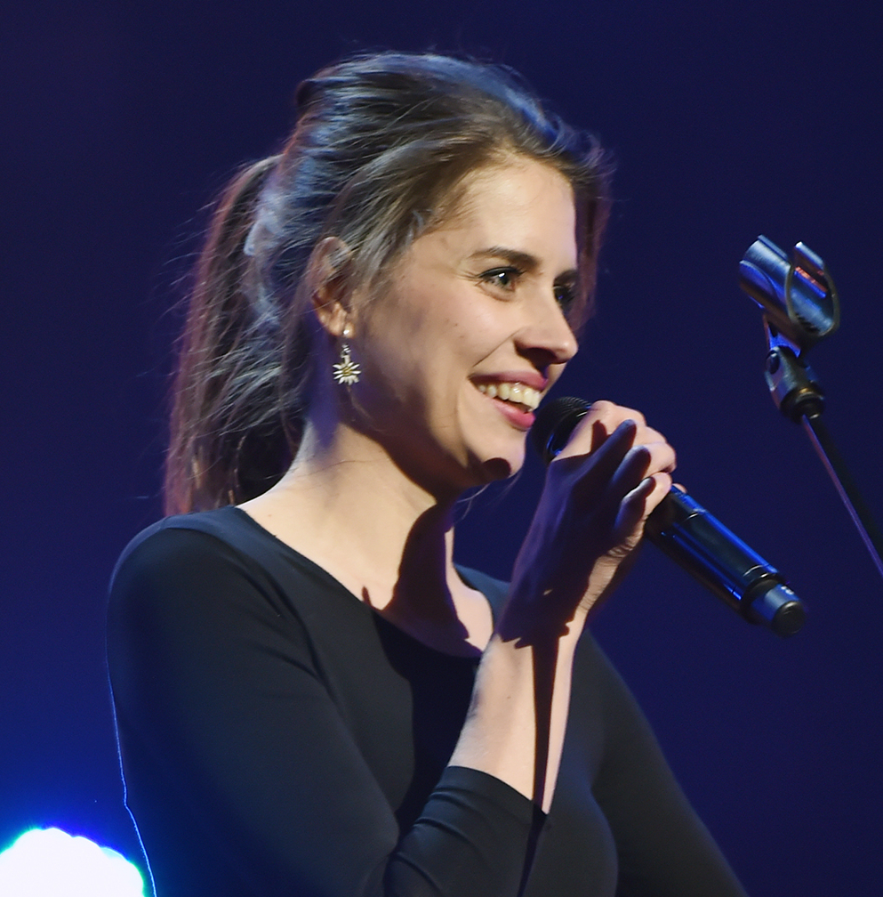 Simona Martausová